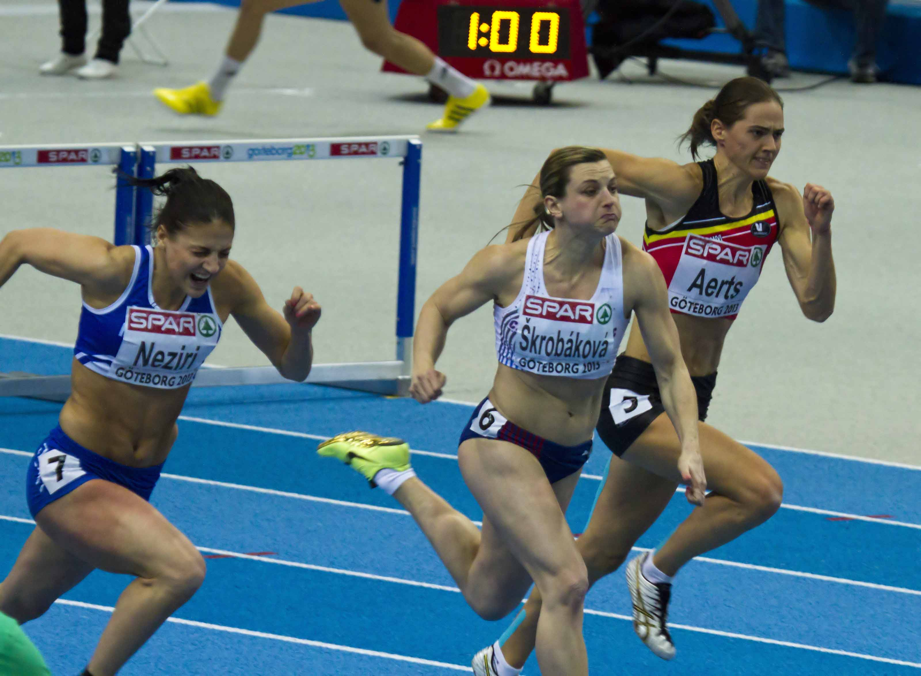 198 sara aerts halve finales 60mH